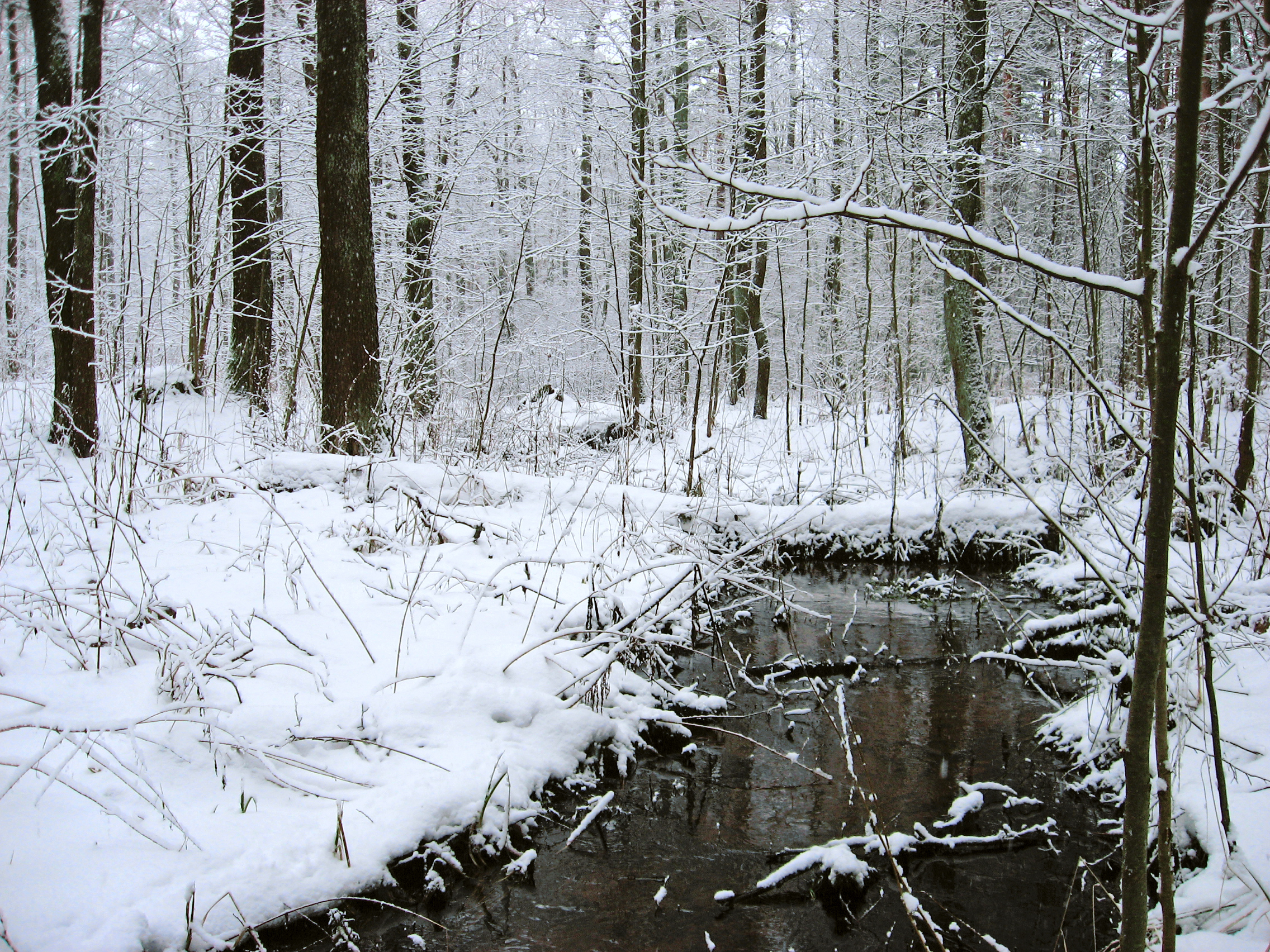 зимой